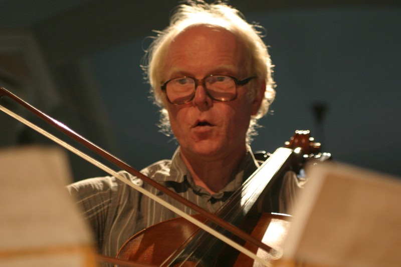 Der Cellist Friedrich Gauwerky bei einem Konzert 2005